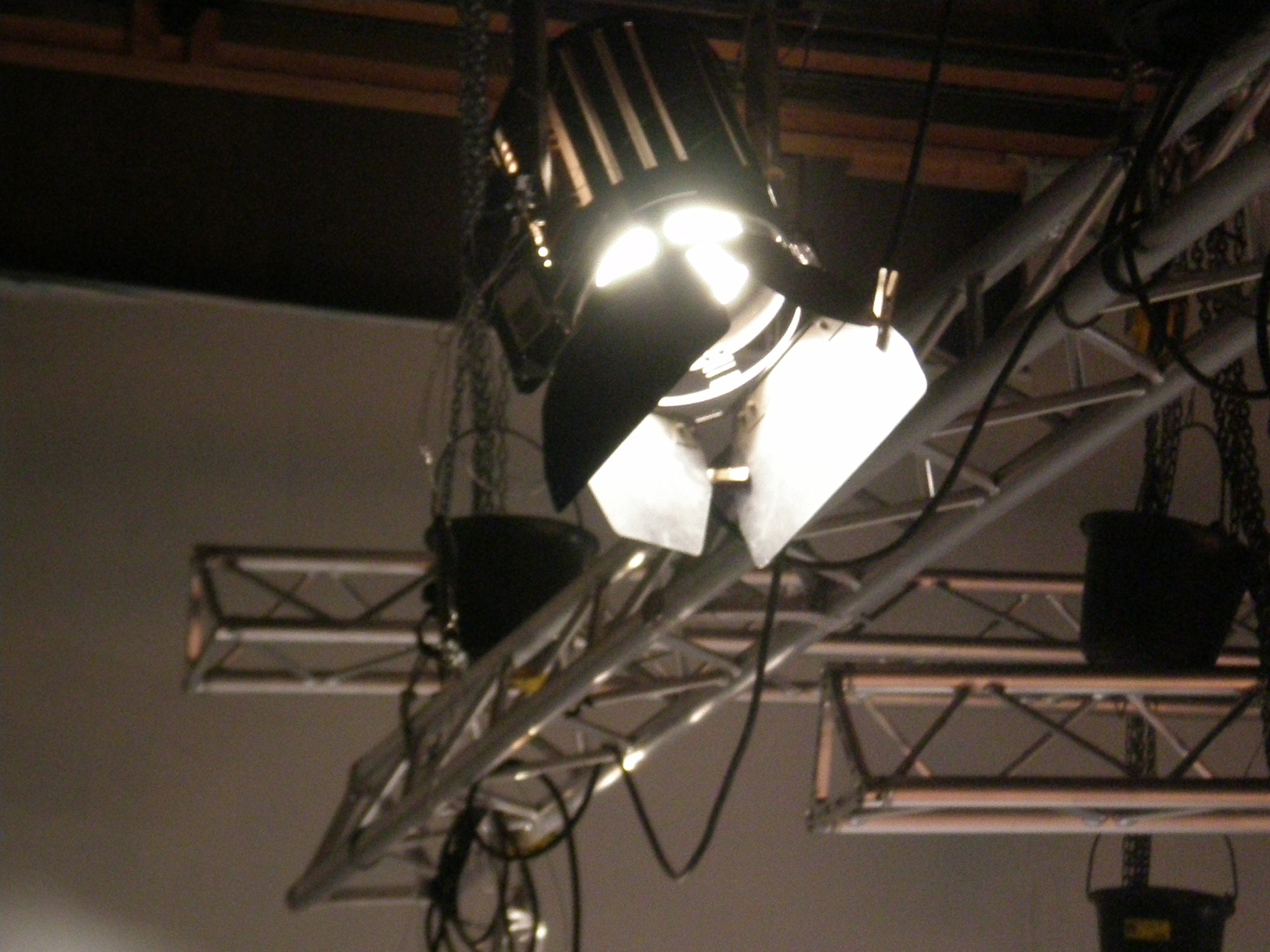 Projecteur de cinéma à lampe tungstène d'une puissance de 1000 W, de la marque Arri, monté sur «trilight».